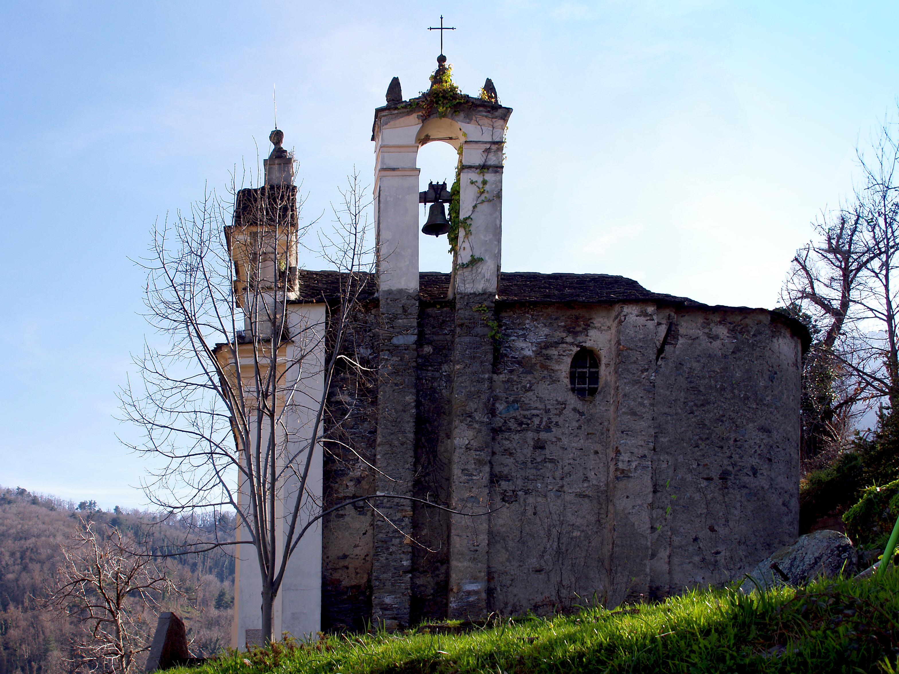 La Porta - Chapelle funéraire Saint-Louis de Gonzagues